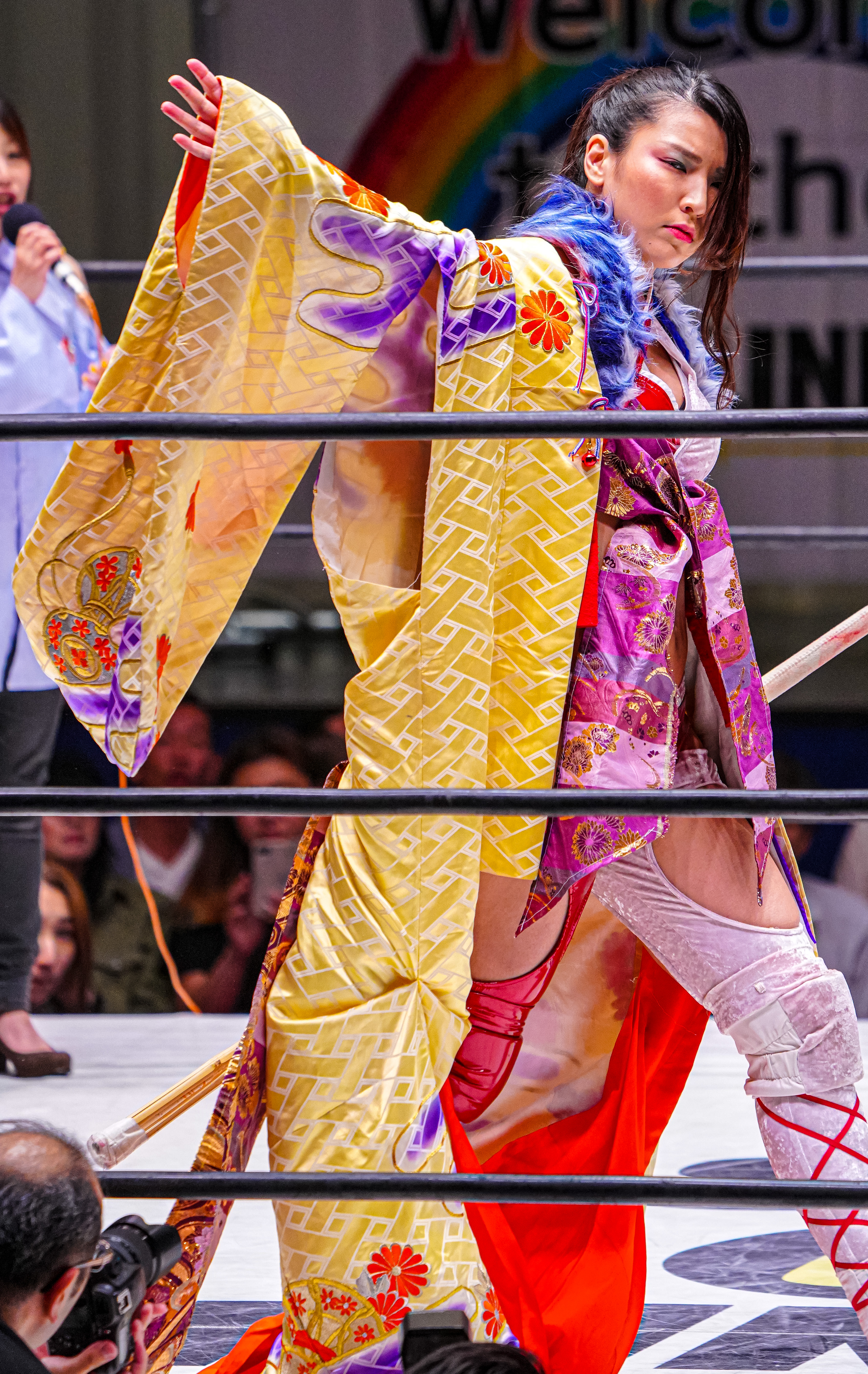 志田光